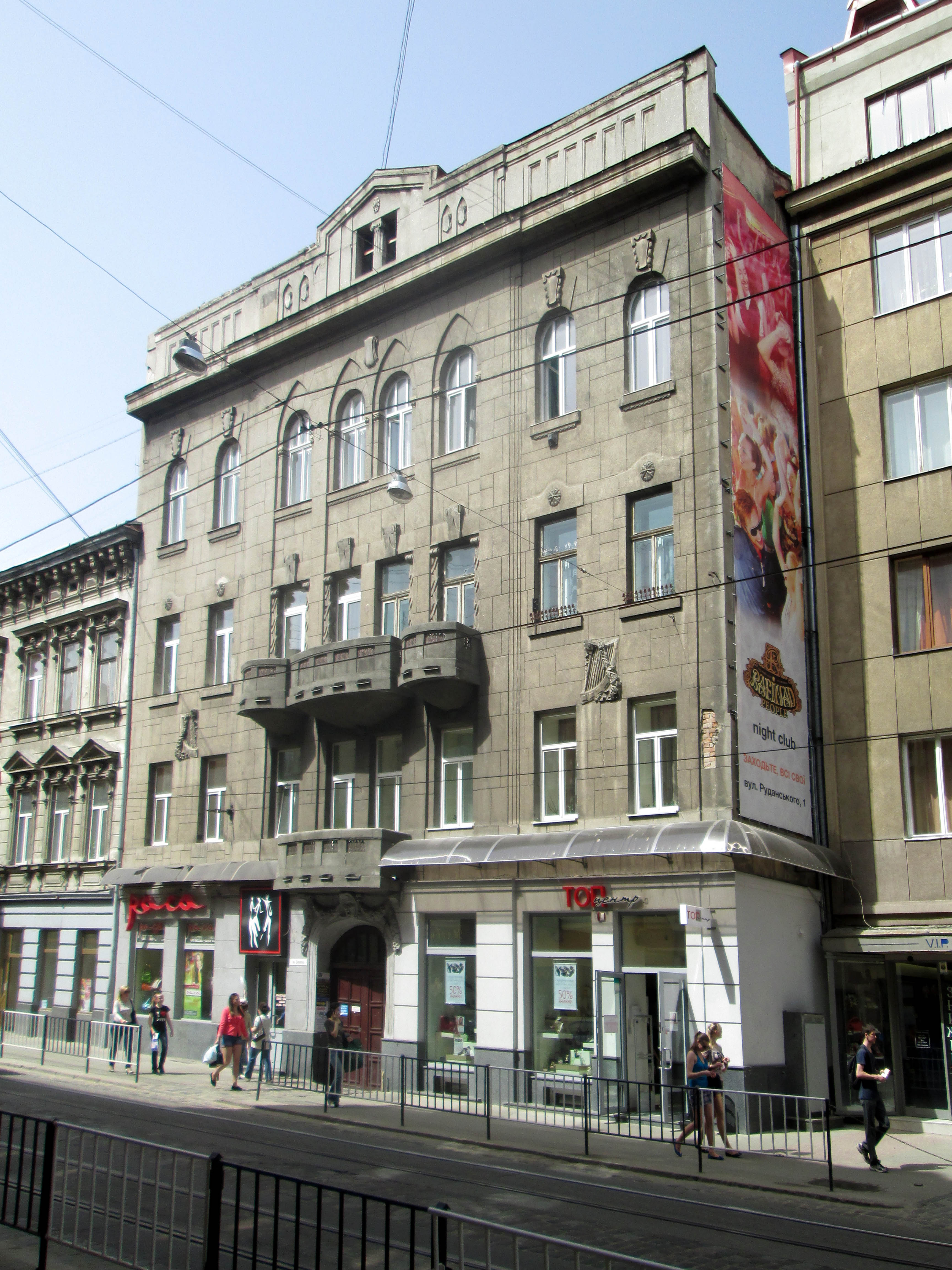 Будинок № 14 на вулиці Дорошенка у Львові. Збудований 1911 року за проектом Юзефа Авіна (1883-1942/43) та Генрика Сальвера (1858—?).